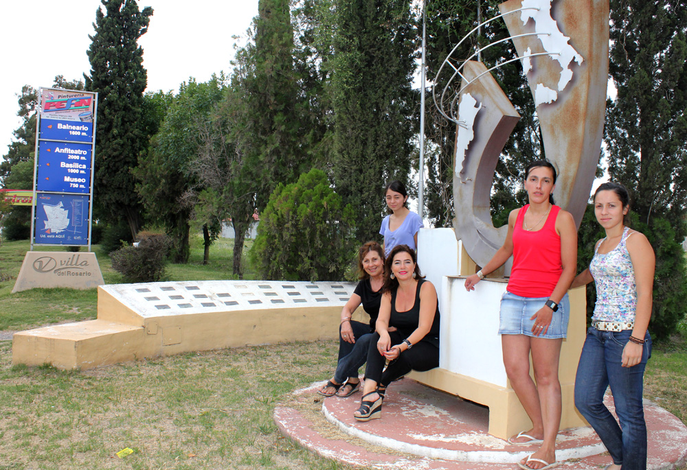 Delegaciòn 2012 intercambio hemanamiento Villa del rosario Strambino